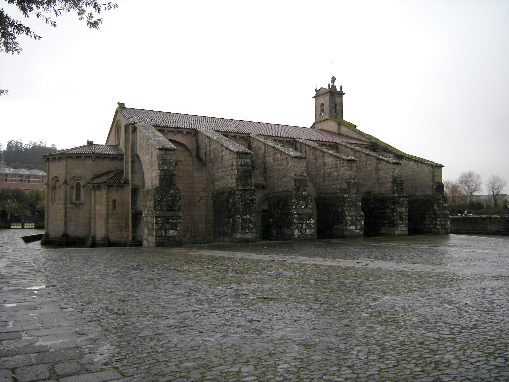 Construida entre los siglos XII y XIII, tiene planta de forma basilical con tres naves segmentadas por pilares y sus correspondientes ábsides. En los siglos XVII y XVIII se construyeron en la parte exterior la torre campanario y fuertes arbotantes a ambos lados de la nave para evitar su derrumbe.